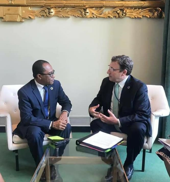 Osttimors Außenminister Dionísio Babo trifft Achim Steiner, Administrator der UNDP